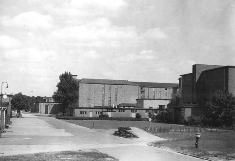 ADN-Zentralbild/ Werkfoto Aus der Arbeit der DEFA. VEB Kinostudio Babelsberg.